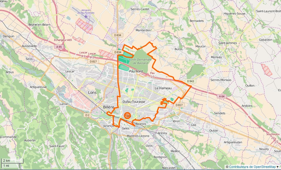 Pau Limite de la ville This map may be incomplete, and may contain errors. Don't rely solely on it for navigation.